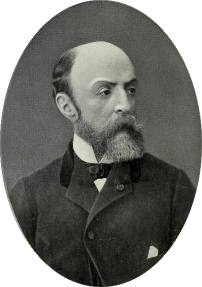 Portrait d'Eugène Fromentin en frontispice de Correspondance et fragments Plon et Nourrit 1912 [1]. L'image est détourée suivant un ovale.